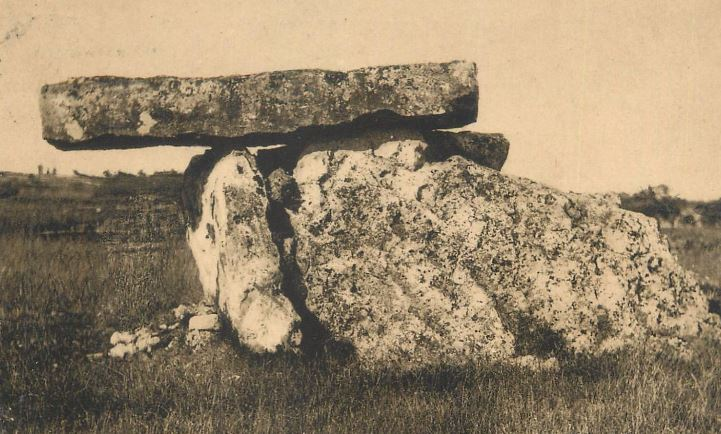 Le dolmen des Boulmiers, commune de Sainte-Maure-de-Touraine.